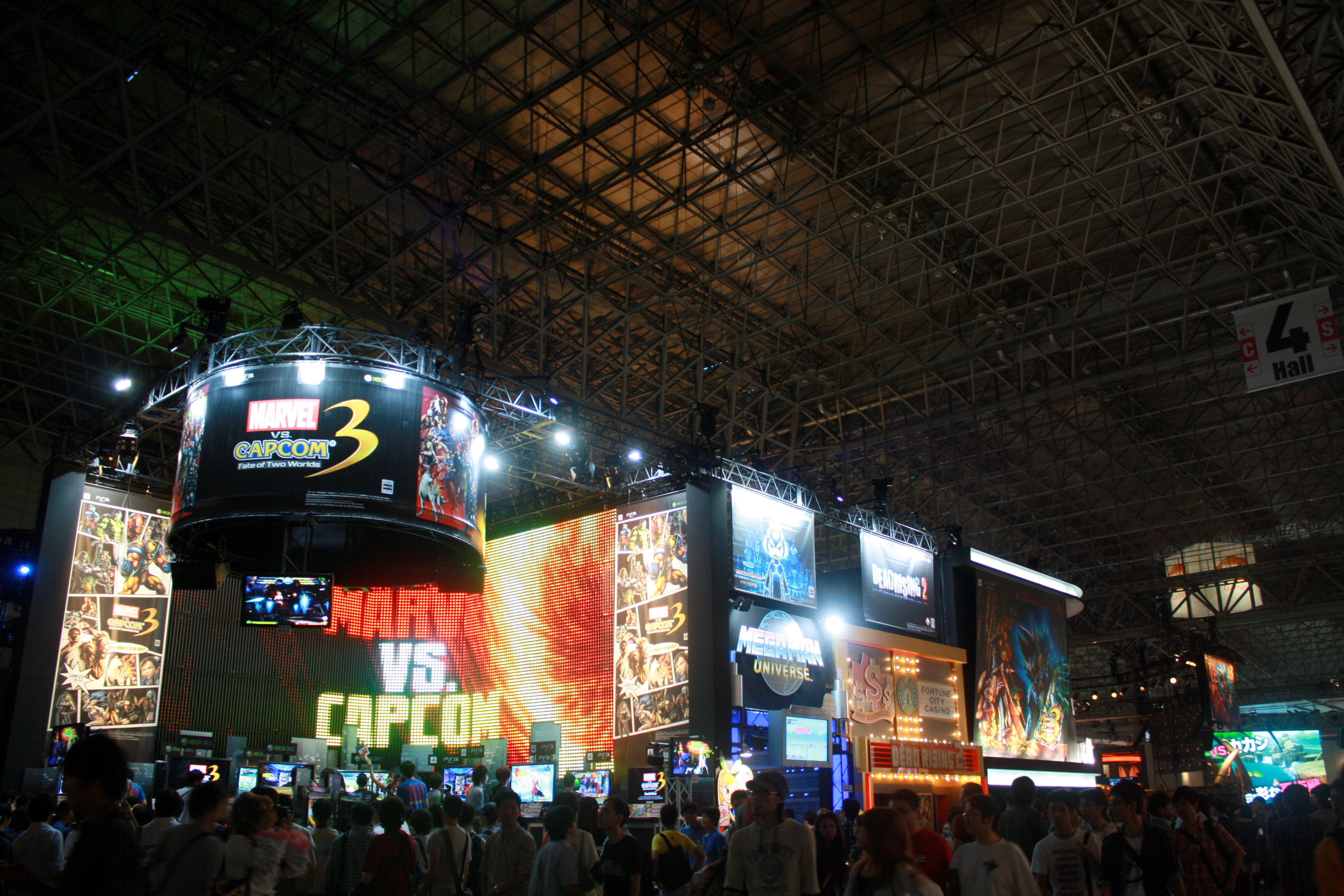 2010東京電玩展，卡普空攤位。